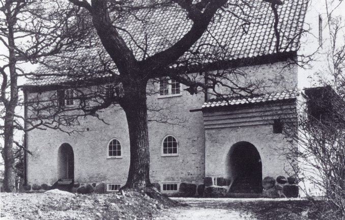 Villa Lagerkrantz